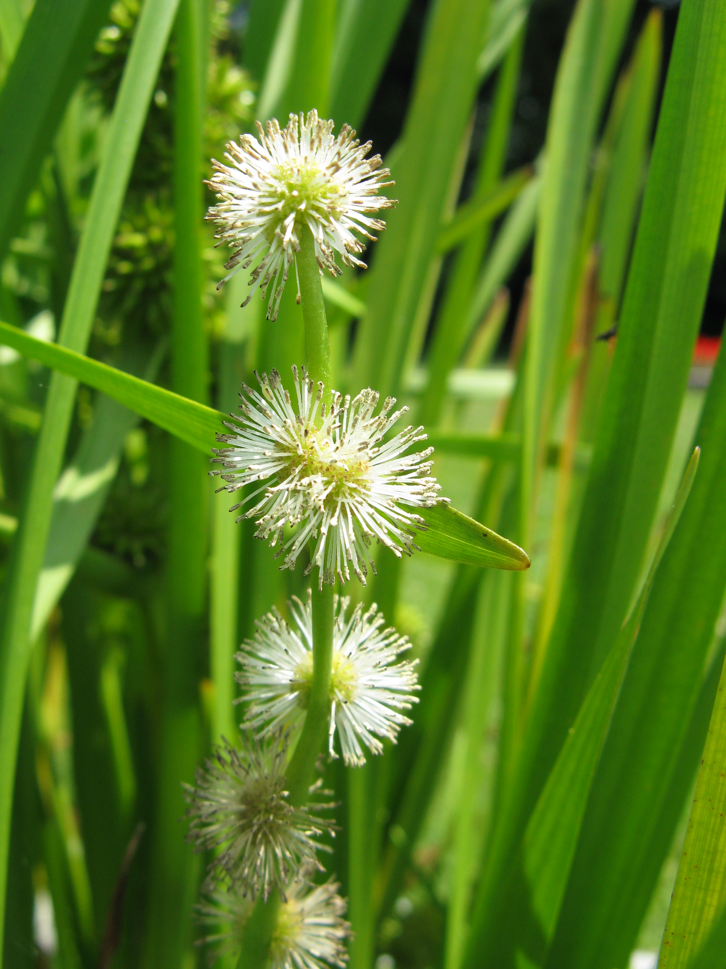 Scientific name Sparganium japonicum